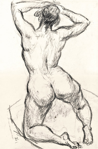 Weiblicher Rückenakt.title QS:P1476,de:"Weiblicher Rückenakt." label QS:Lde,"Weiblicher Rückenakt."